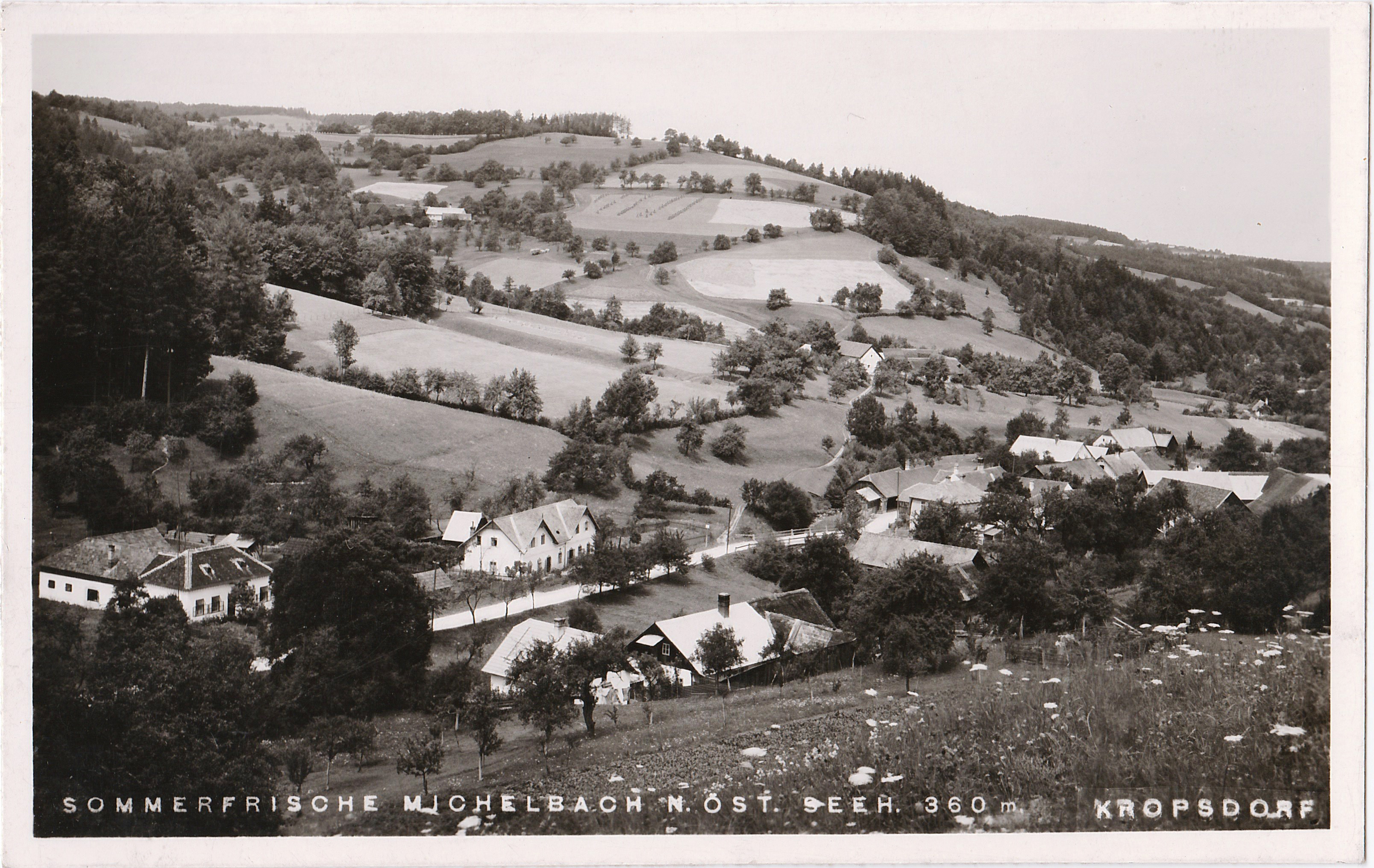 Michelbach Kropfsdorf ca. 1950 von Osten. Zu sehen ist das Gasthaus Kleemann.